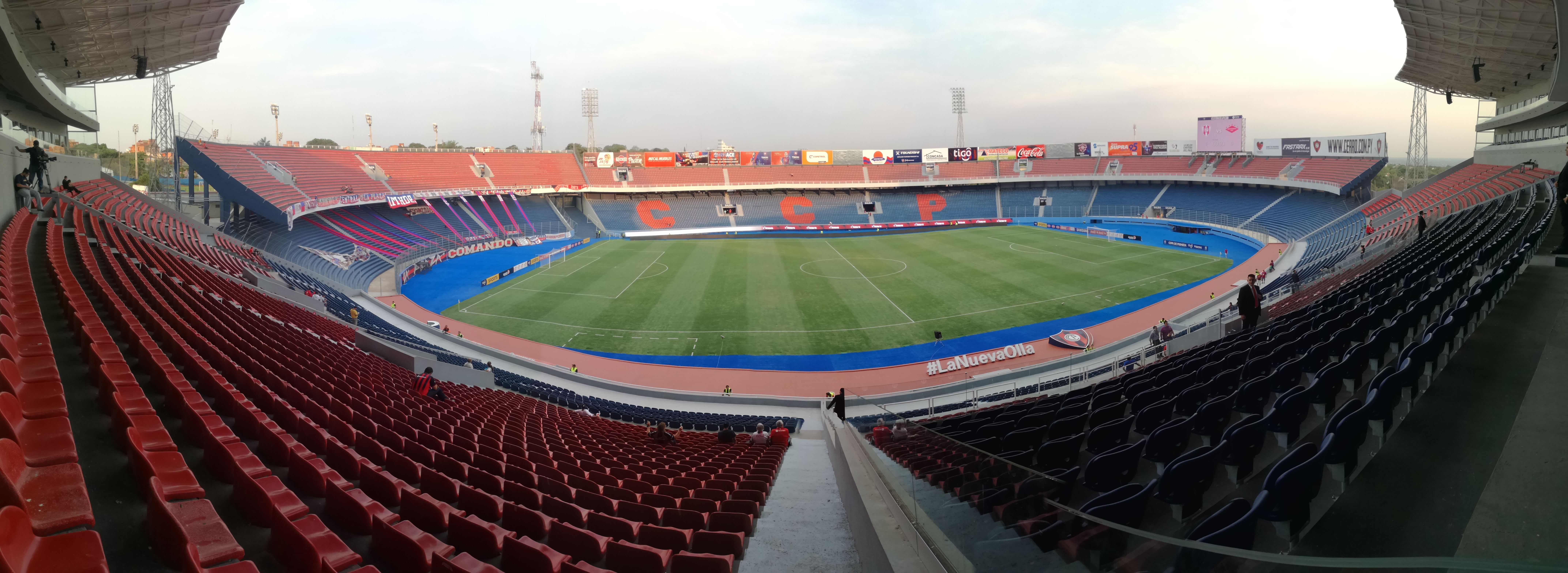 Panorámica de la Nueva Olla